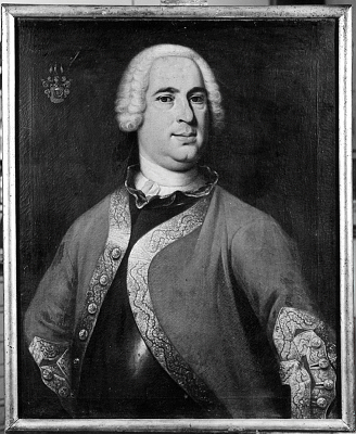 Portrett av Nicolay Frederik Reichwein med våpenskjold